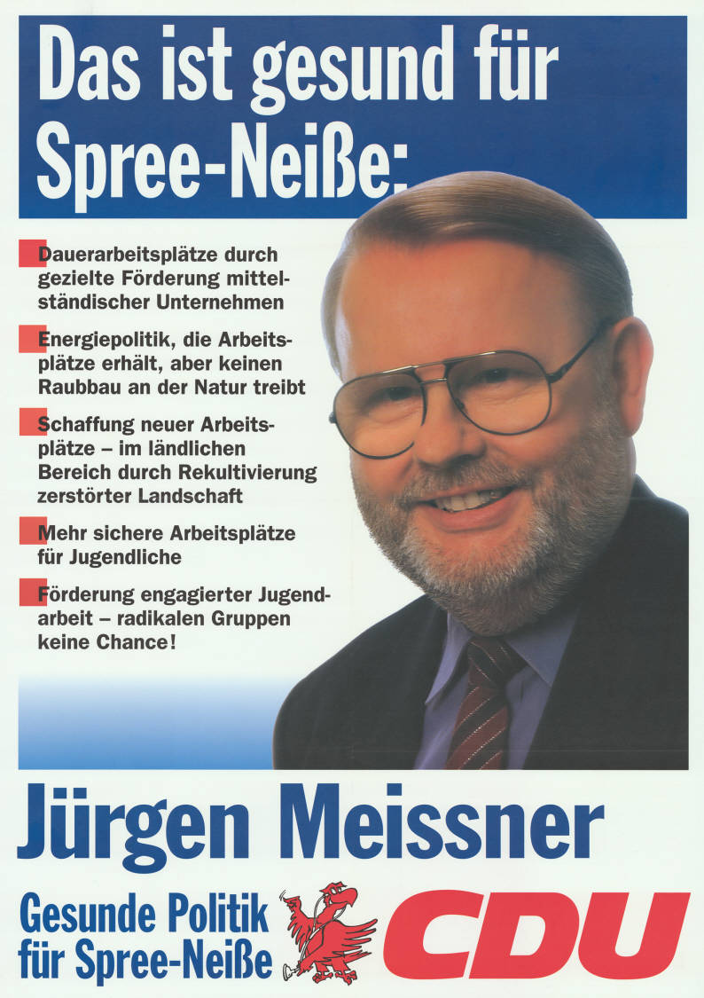 Das ist gesund für Spree-Neiße: . Dauerarbeitsplätze durch gezielte Förderung mittelständischer Unternehmen . Energiepolitik, die Arbeitsplätze erhält, aber keinen Raubbau an der Natur treibt . Schaffung neuer Arbeitsplätze im ländlichen Bereich durch Rekultivierung zerstörter Landschaft . Mehr sichere Arbeitsplätze für Jugendliche . Förderung engagierter Jugendarbeit - radikalen Gruppen keine Chance! Jürgen Meissner Gesunde Politik für Spree-Neiße CDU Abbildung: Porträtfoto Plakatart: Kandidaten-/Personenplakat mit Porträt Objekt-Signatur: 10-033 : 234 Bestand: Landtagswahlplakate Brandenburg (10-033) GliederungBestand10-18: Landtagswahlplakate Brandenburg (10-033) » CDU Lizenz: KAS/ACDP 10-033 : 234 CC-BY-SA 3.0 DE